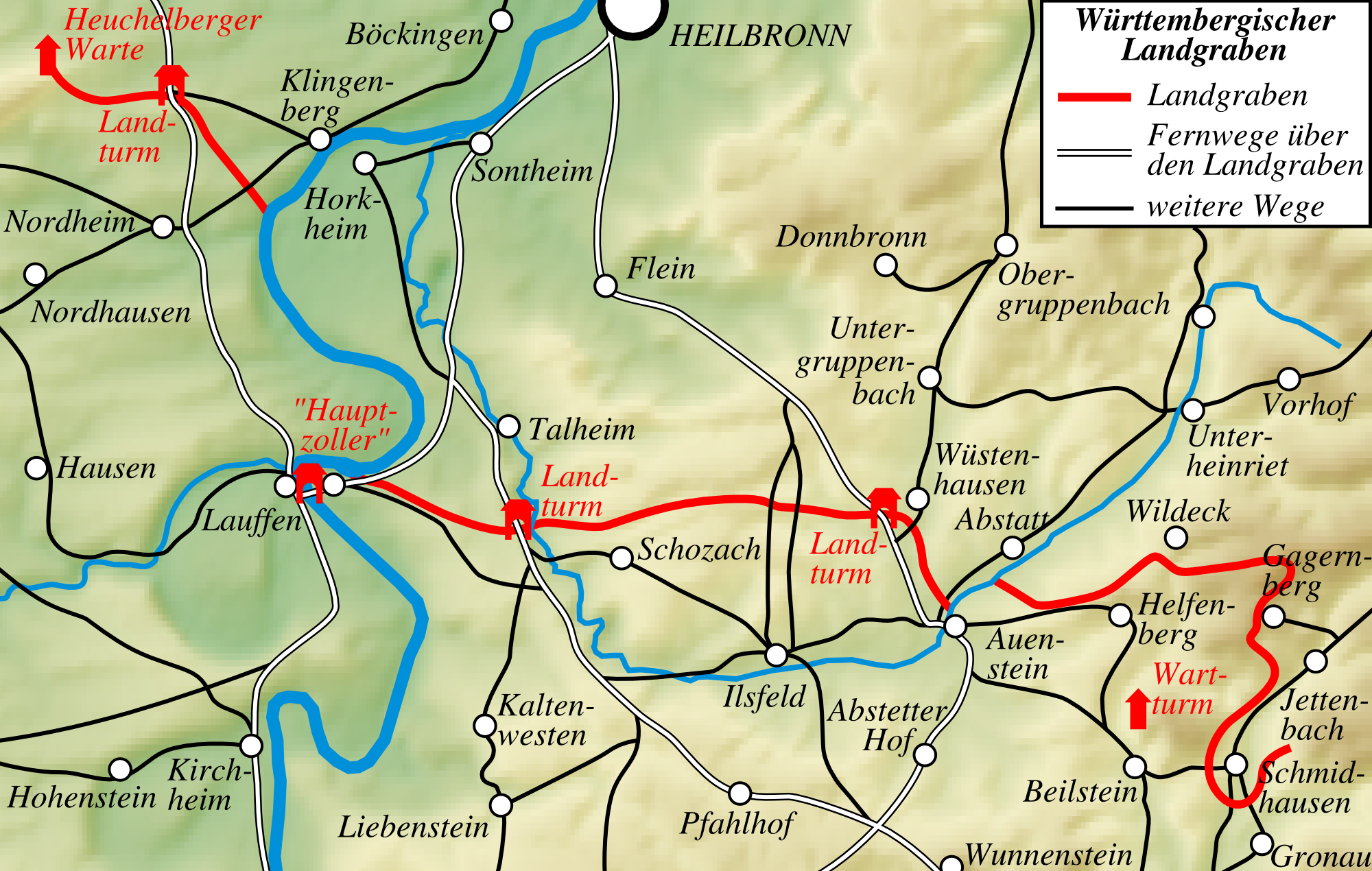 Karte des Württembergischen Landgrabens in den Zeiten des Herzogtums Württemberg.